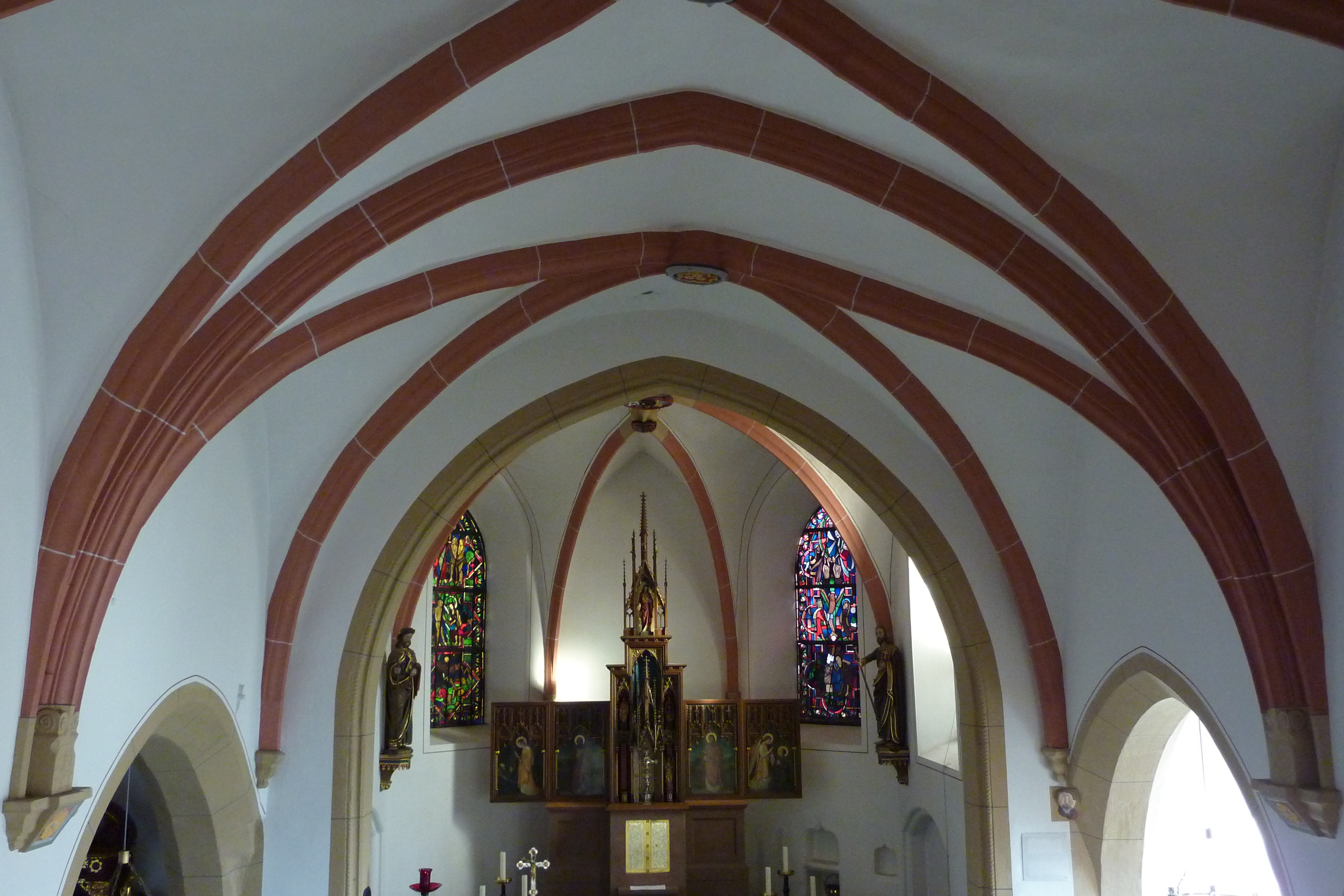 katholische Pfarrkirche St. Philippus und Jakobus in Lommersdorf, Blick von der Empore zum Chor